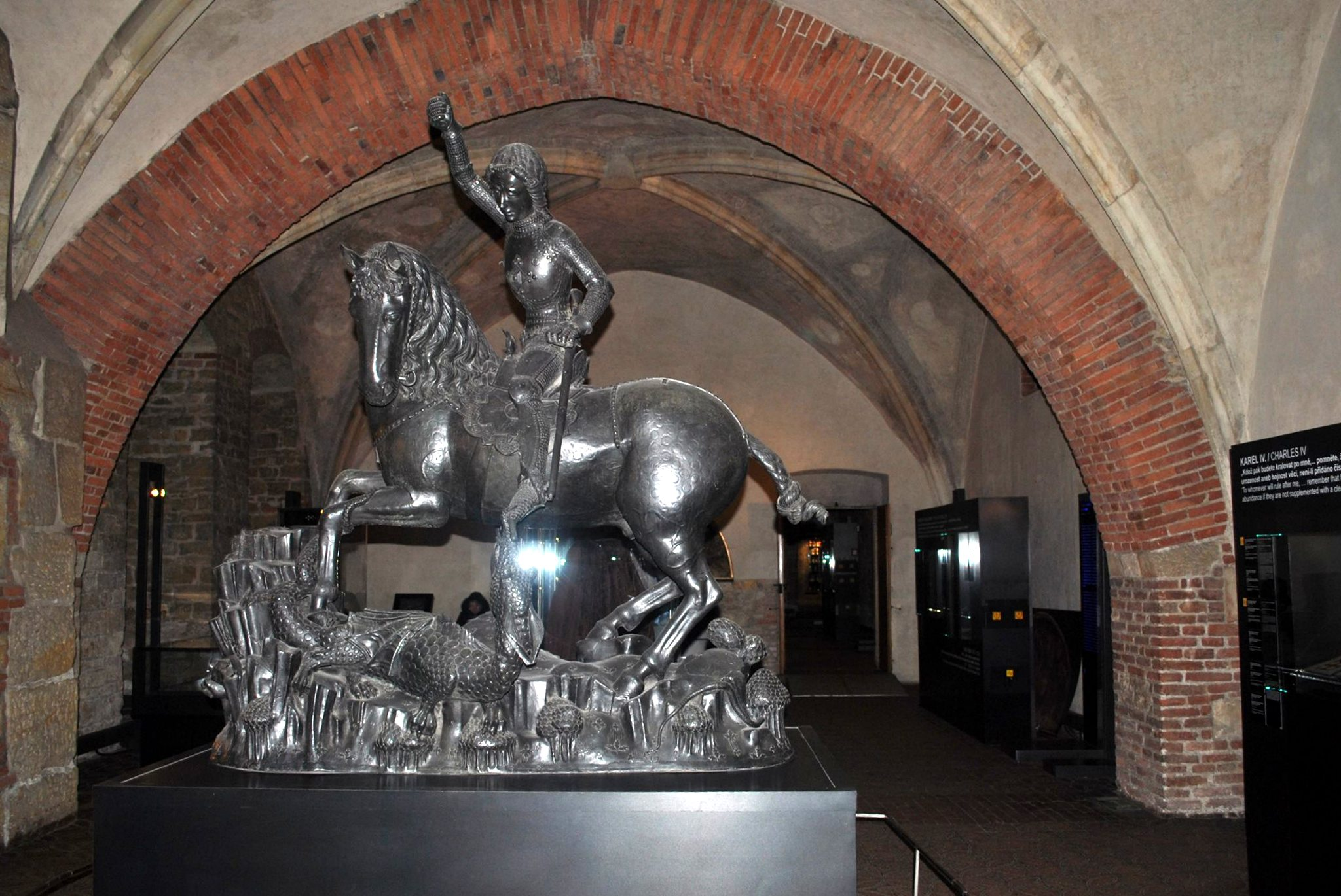 Prága , 2015 márciusban, a Kolozsvári-testvérek eredeti alkotása a prágai Vármúzeumban